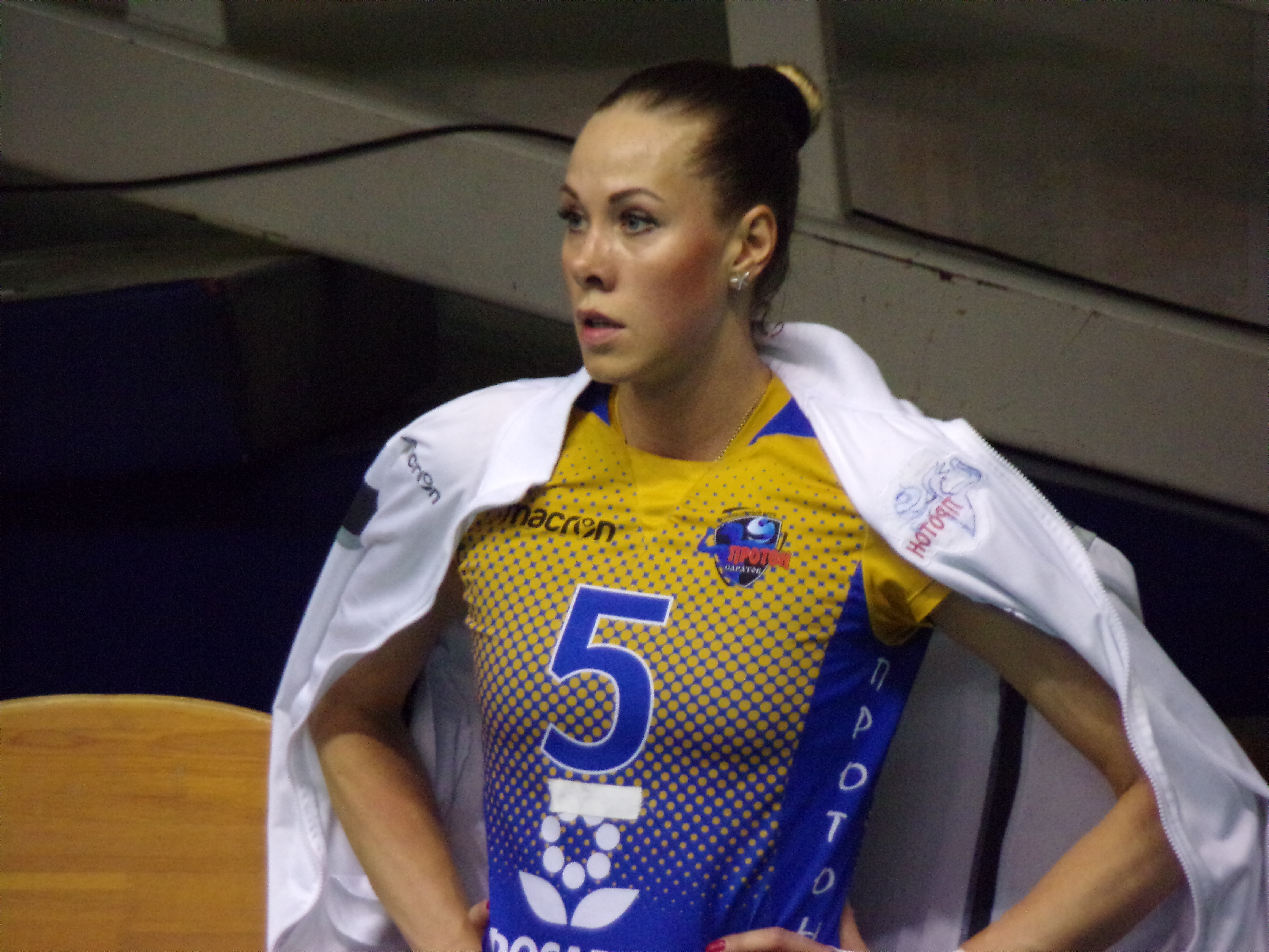 Екатерина Николаевна Орлова